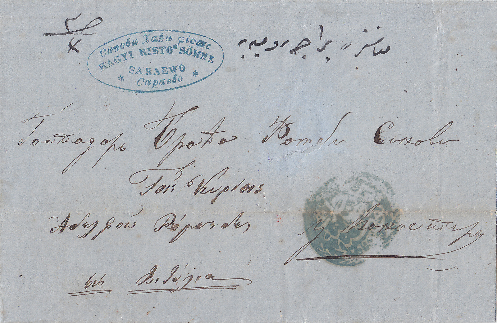 Писмо от Хаджи Ристо в Сараево до Братя Робеви в Битоля.